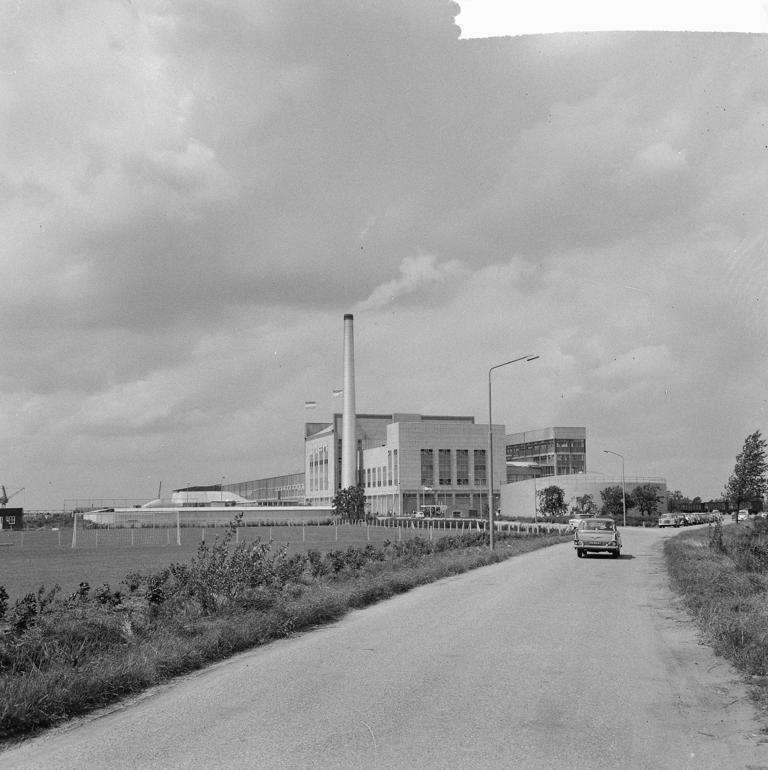 Collectie / Archief : Fotocollectie Anefo Reportage / Serie : [ onbekend ] Beschrijving : Prins Bernhard Glasfabriek "De Maas" te Tiel geopend, exterieur fabriek Datum : 8 juni 1964 Locatie : Gelderland, Tiel Trefwoorden : GLASFABRIEKEN, exterieur Persoonsnaam : Bernhard, prins Fotograaf : Nijs, Jac. de / Anefo Auteursrechthebbende : Nationaal Archief Materiaalsoort : Negatief (zwart/wit) Nummer archiefinventaris : bekijk toegang 2.24.01.03 Bestanddeelnummer : 916-5212